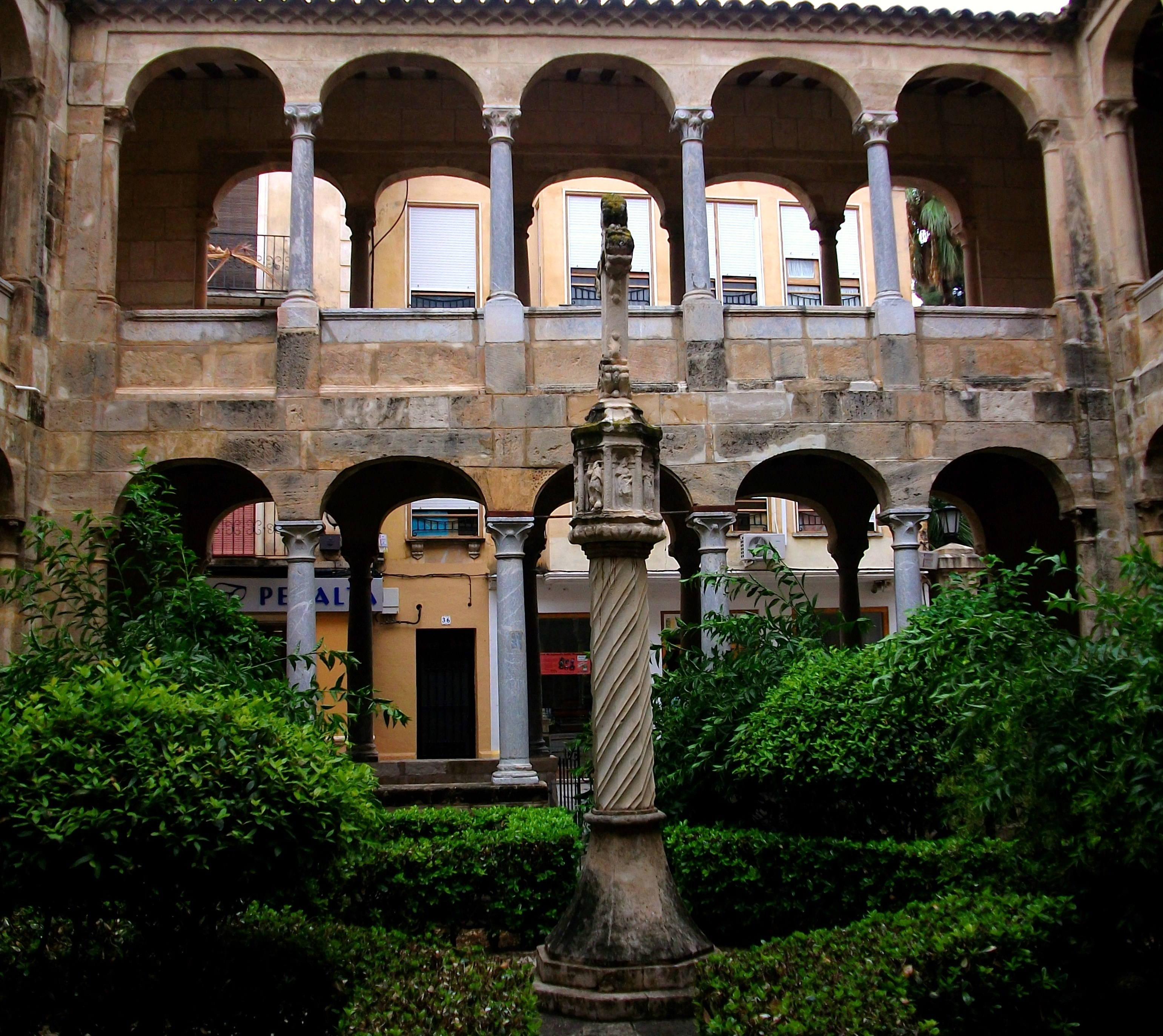 Claustre de la catedral d'Oriola.